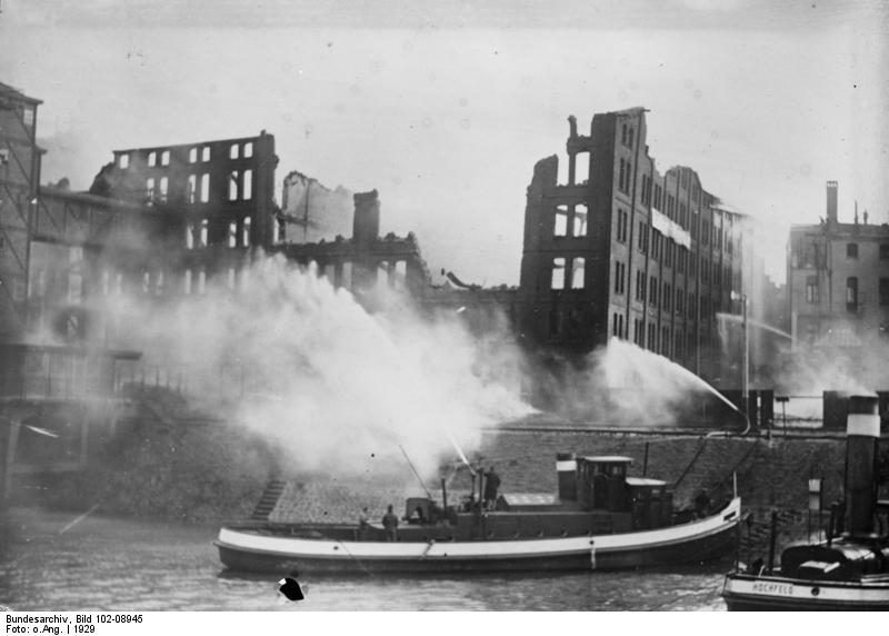 Eine schwere Brandkatastrophe im Hafen von Duisburg ! Feuerlöschboote bekämpfen den Riesenbrand eines Lagerhauses im Innenhafen von Duisburg. Das Lagerhaus wurde vollständig vernichtet. Der Schaden geht in die Millionen Mark.